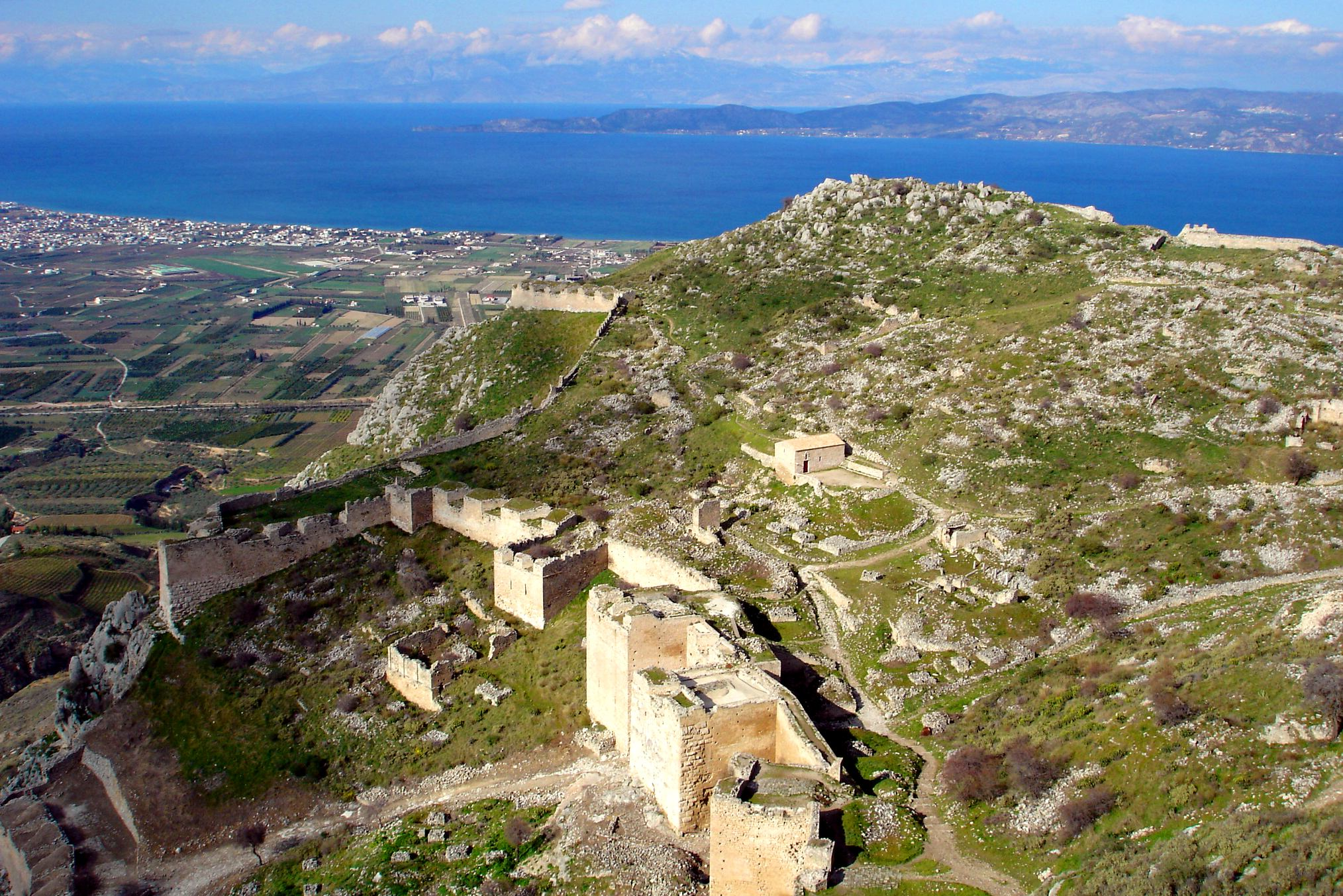 Akrokorinth